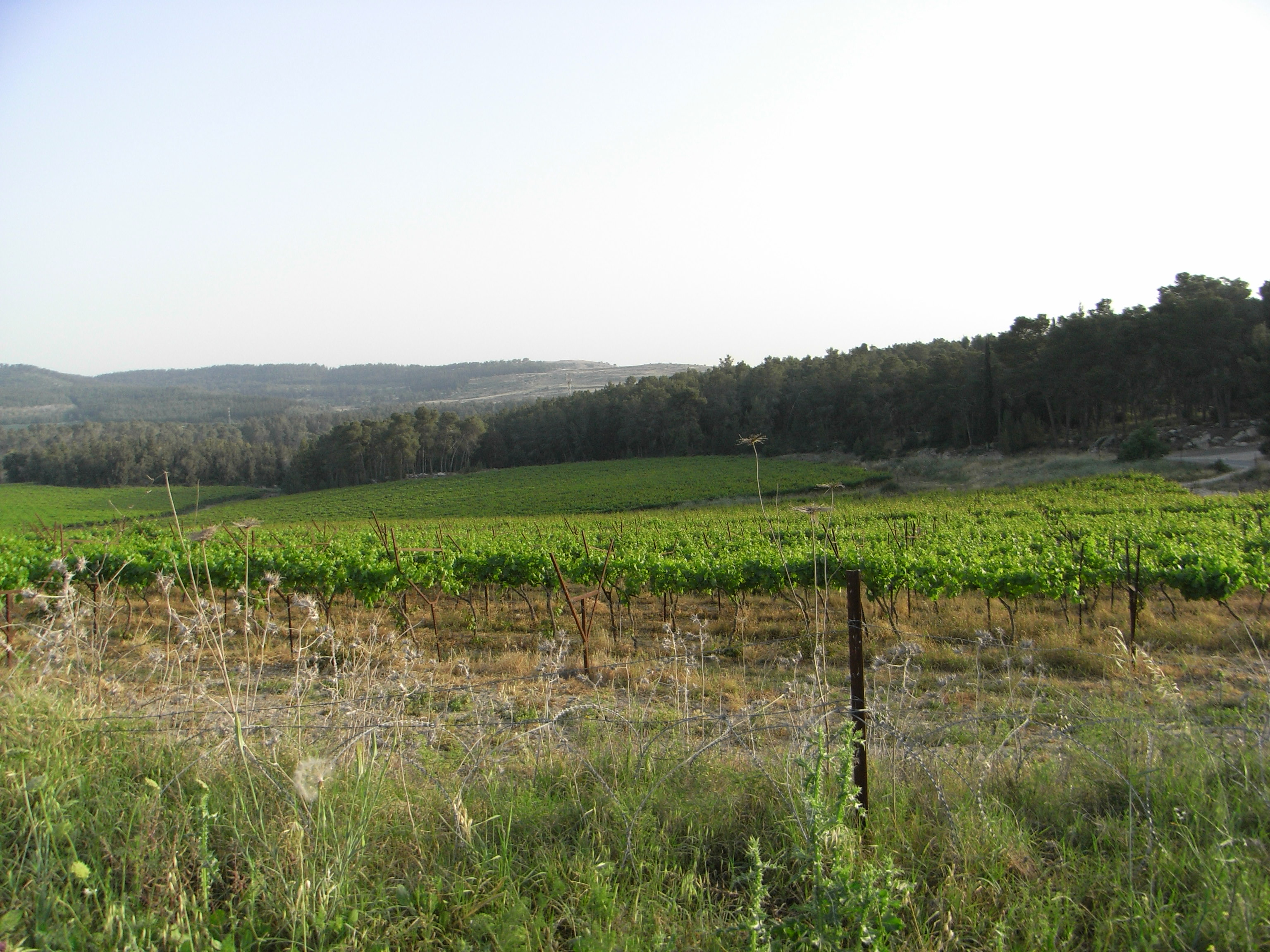 כרם באזור פרוזדור ירושלים